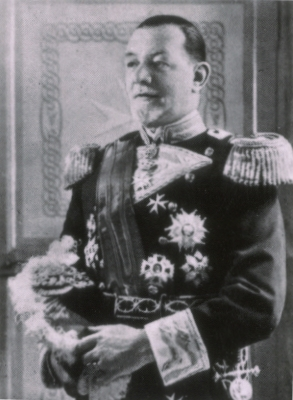 Galeas von Thun und Hohenstein, 75. Großmeister des SMOM